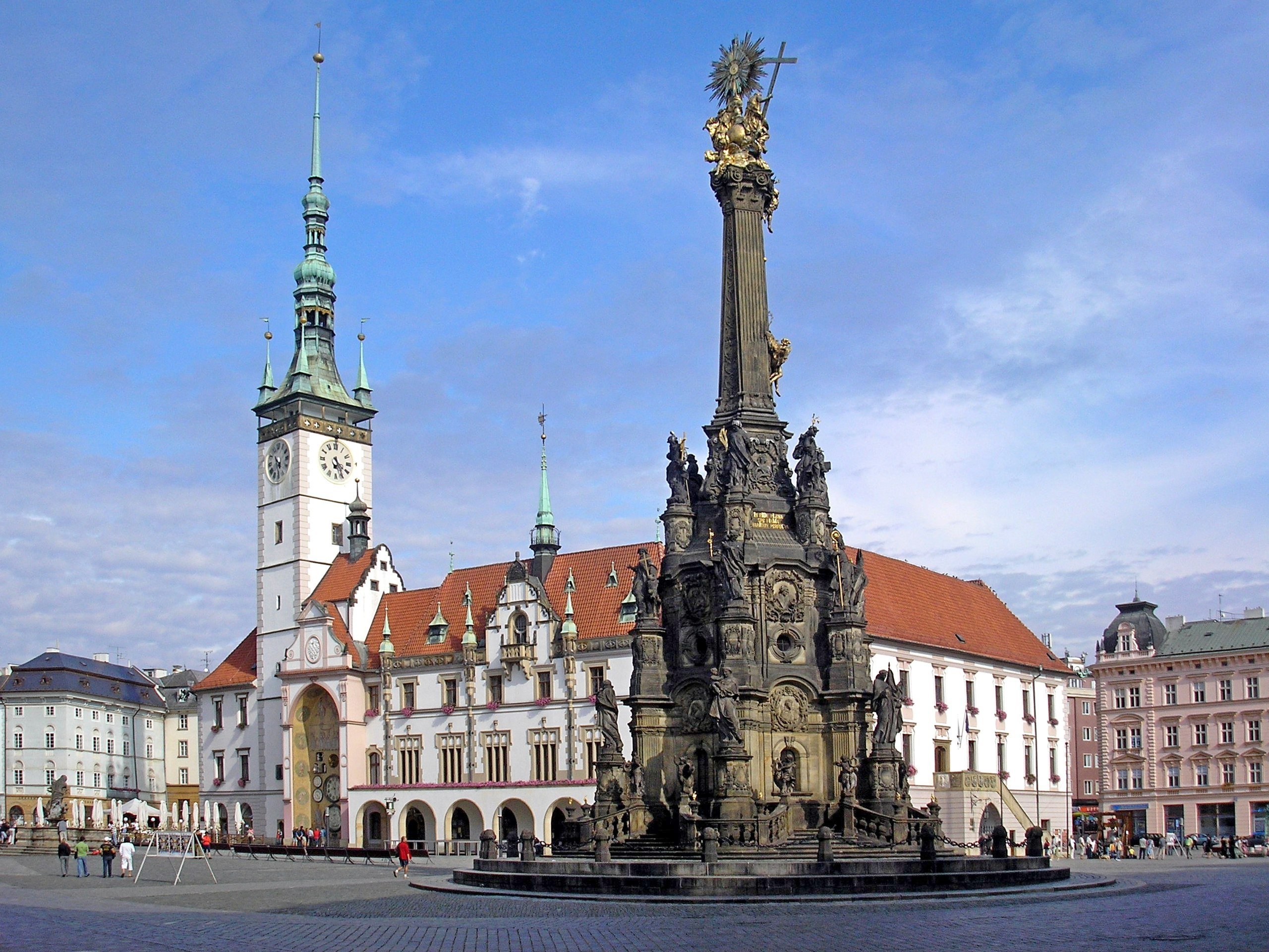 Hauptplatz in Olmütz